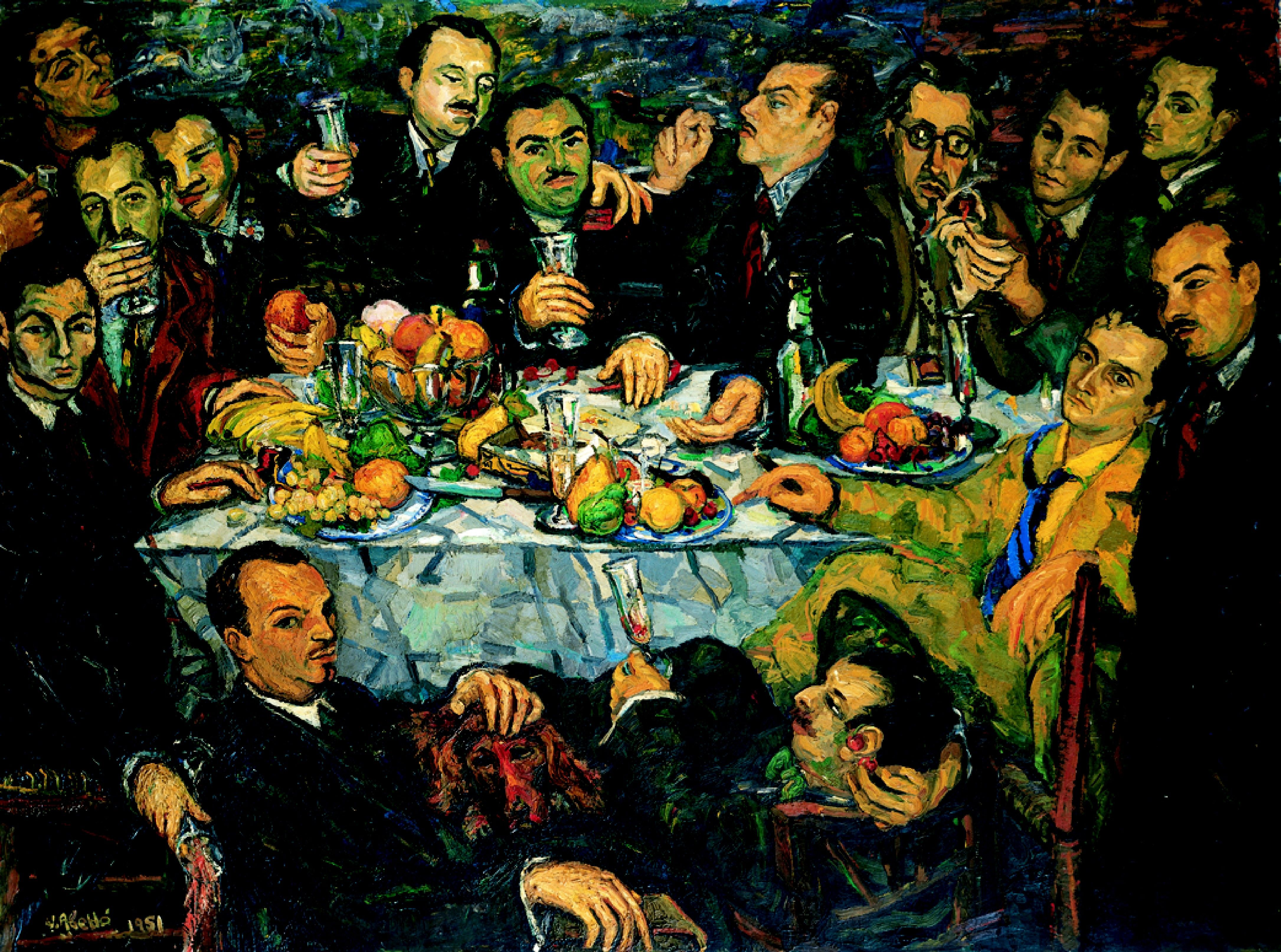 Pintura on es veu una trobada d'amics entorn una taula